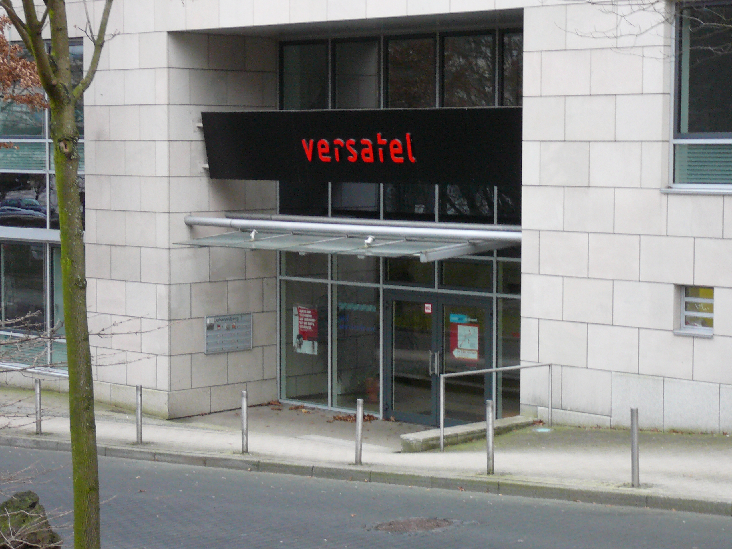 Johannisberg, Wuppertal